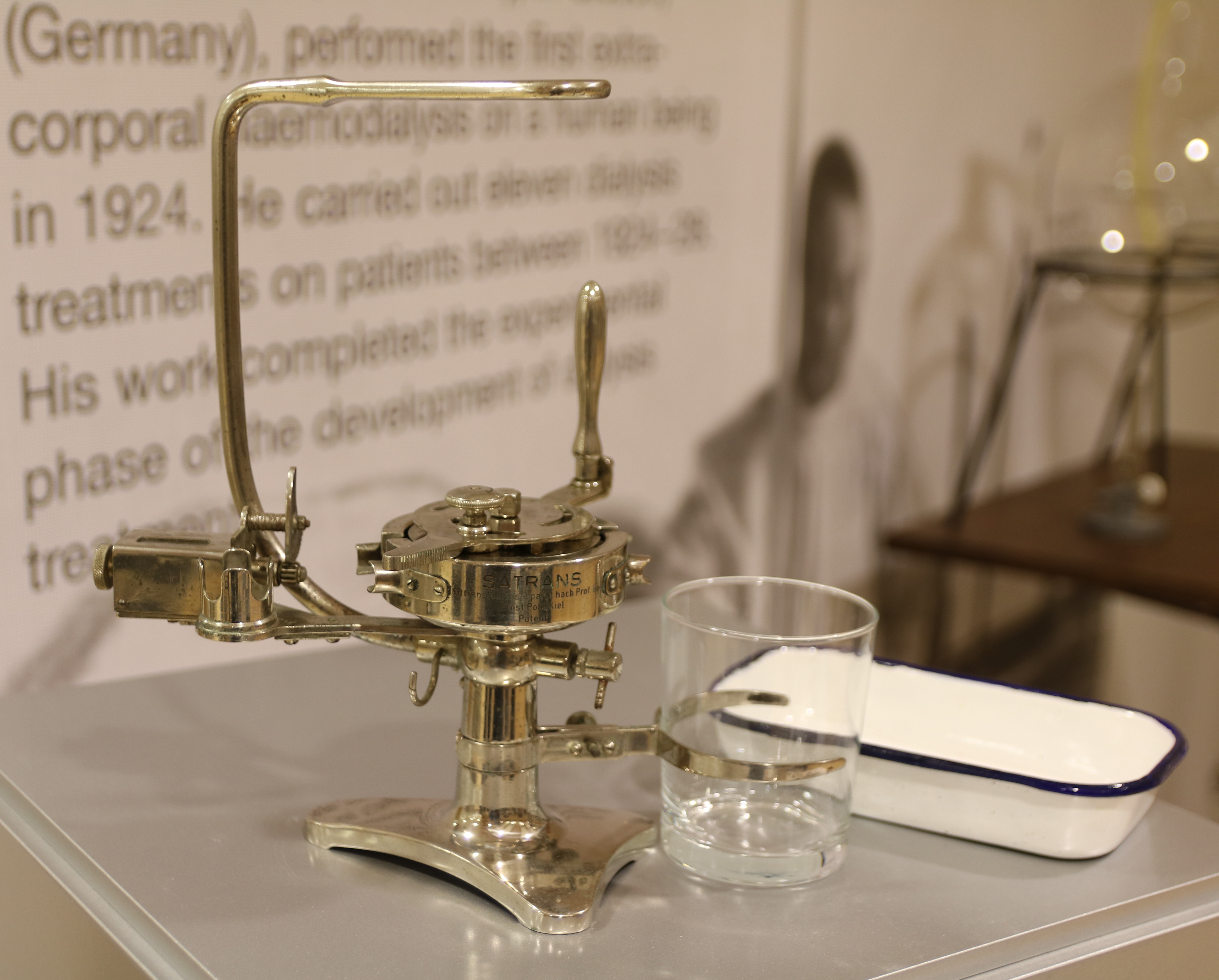 Beck´scher Transfusionsapparat ("Blutmühle") von Ernst Pohl. Dialysemuseum Fürth